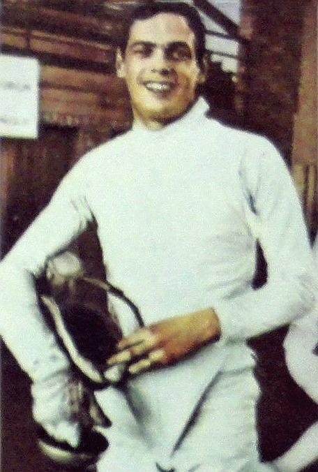 CAMPIONI DELLO SPORT 1970/71-n.299-KULCSAR-SCHERMA